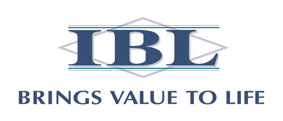 Logo d'IBL Group